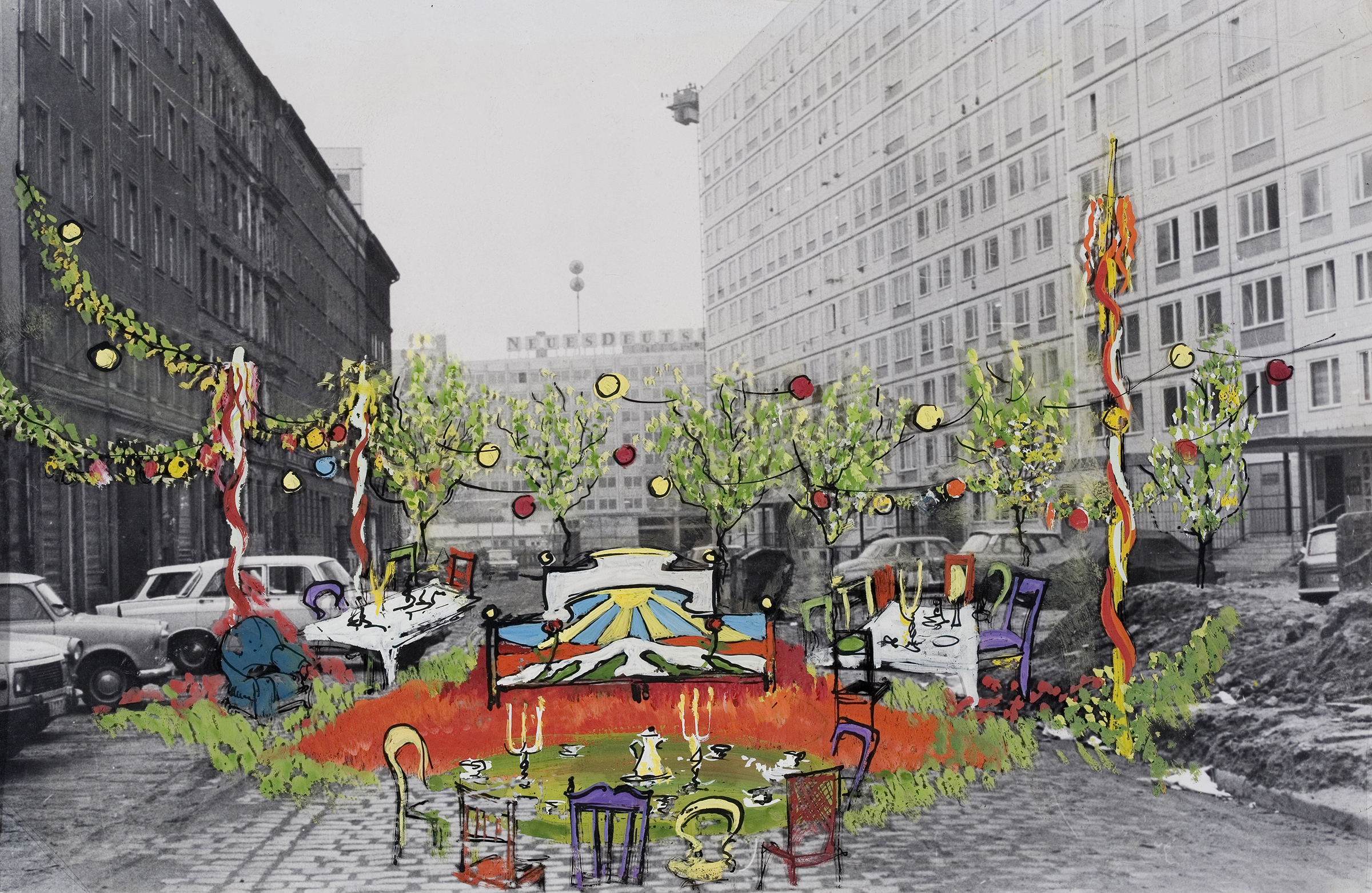 Entwurf zu Paul und Paula, Film 1973, Szene mit fahrendem Bett in der Singerstrasse, Berlin-Friedrichshain, nicht realisiert